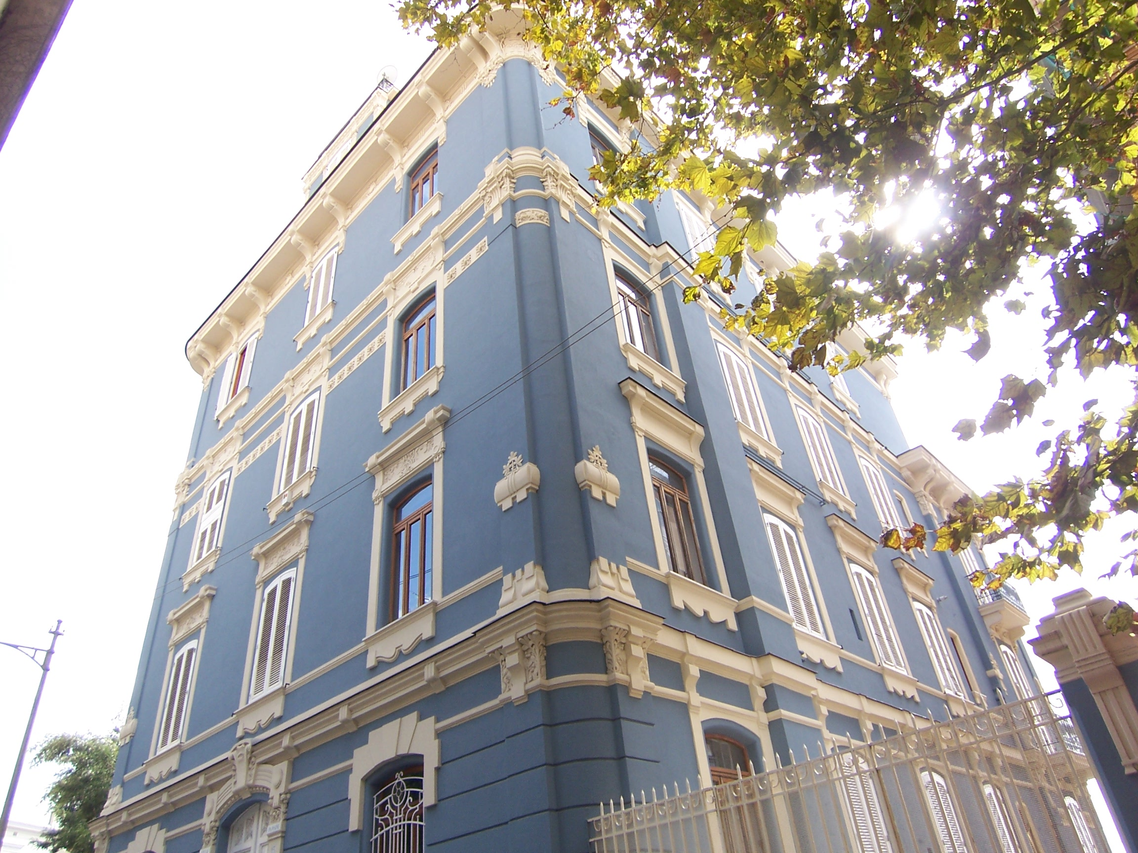 Liberty in Via Palizzi